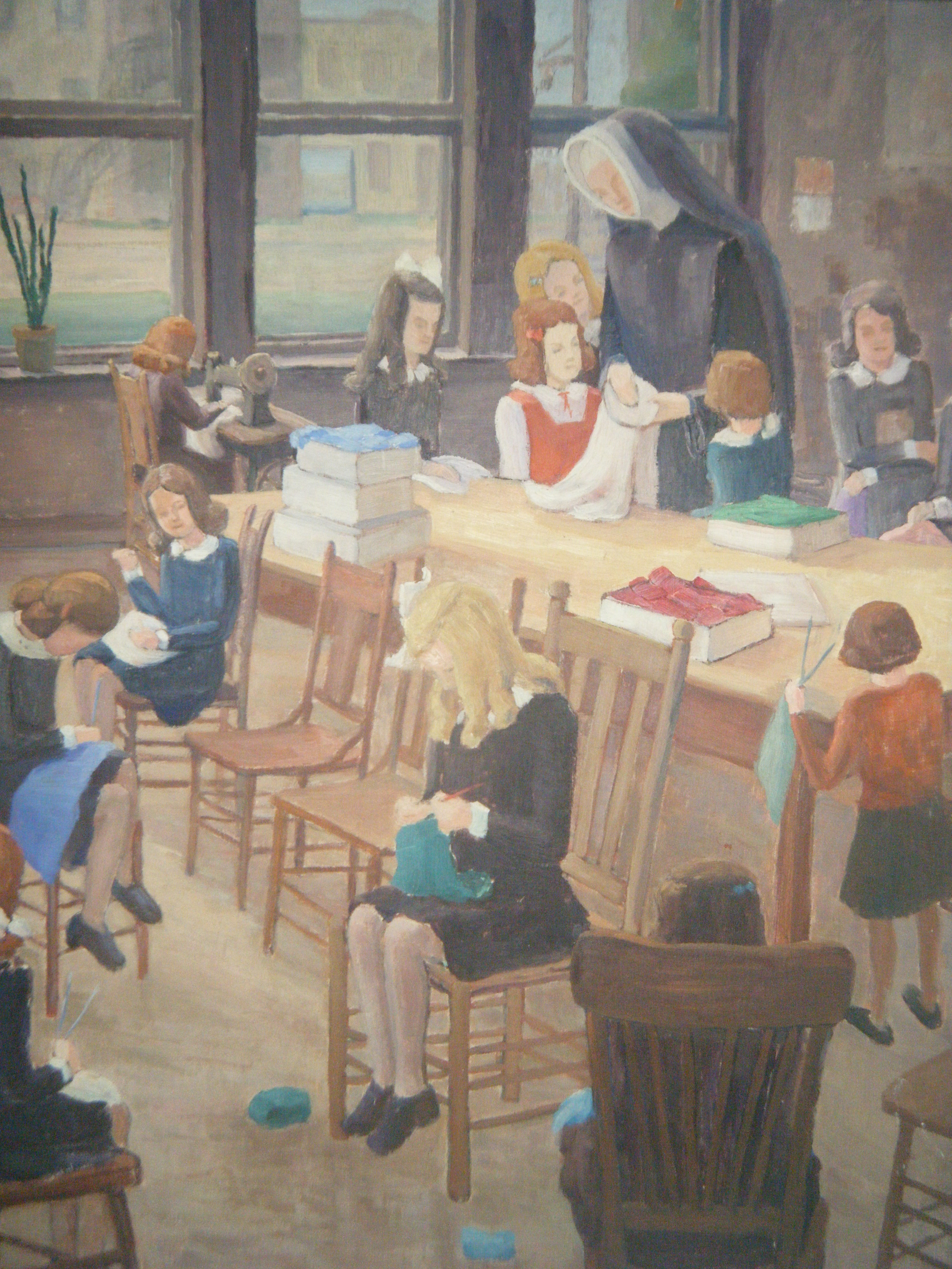 la salle de classe